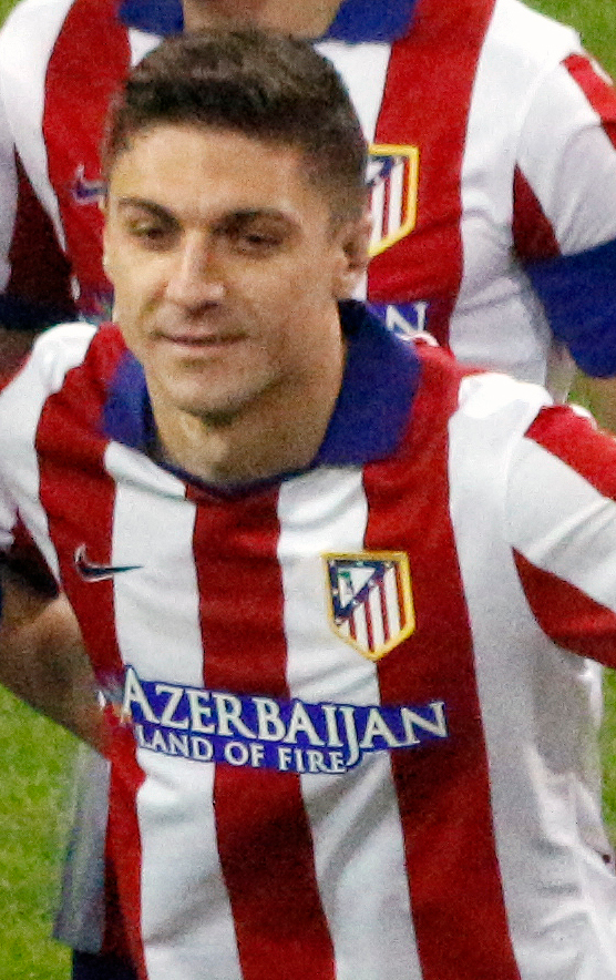 Guilherme Siqueira vor dem Achtelfinalspiel der Copa del Rey gegen Real Madrid